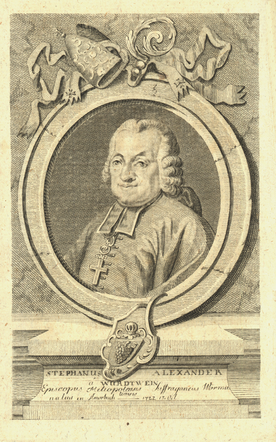 Stephan Alexander Würdtwein (1719-1796), Weihbischof von Worms, Kirchengeschichtler